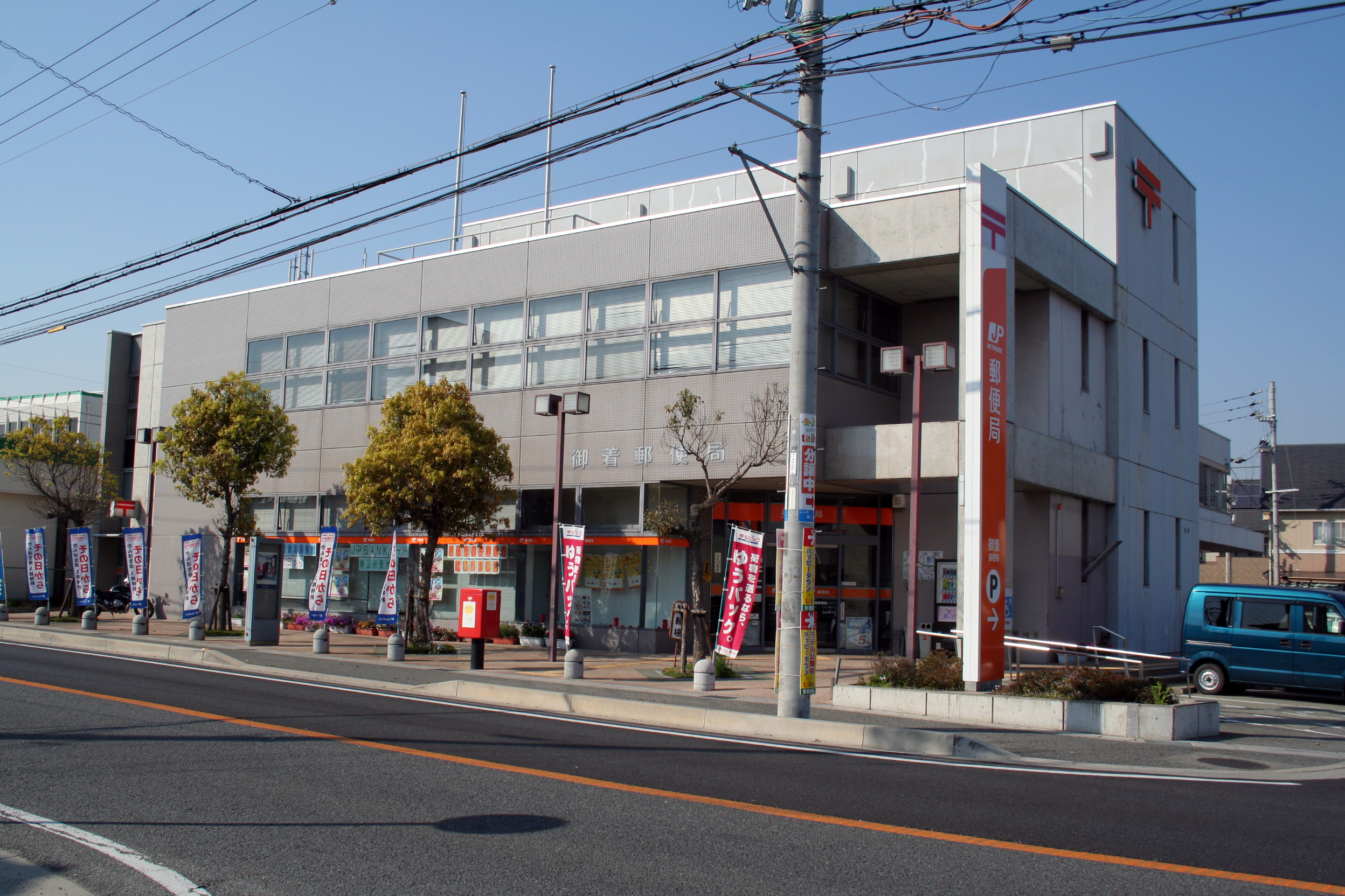 兵庫県姫路市御着にある御着郵便局。